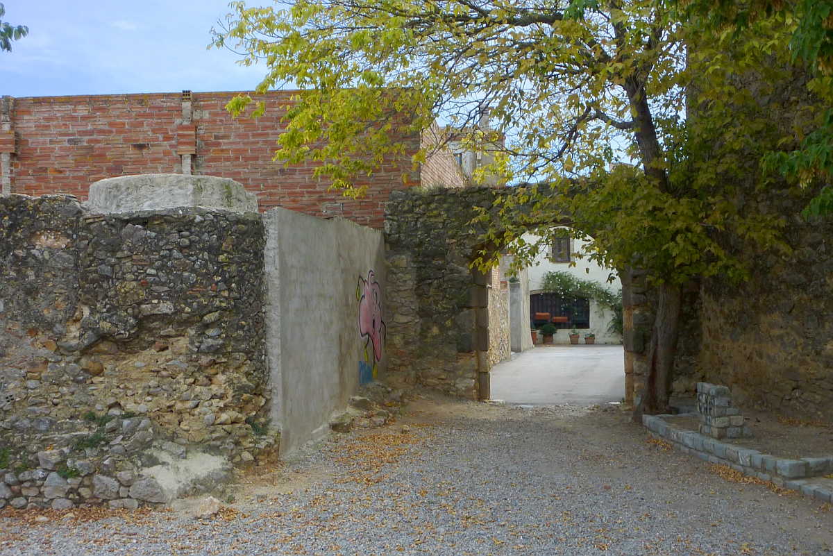 La puerta de la antigua muralla y restos del muro en Viladamat (Girona)